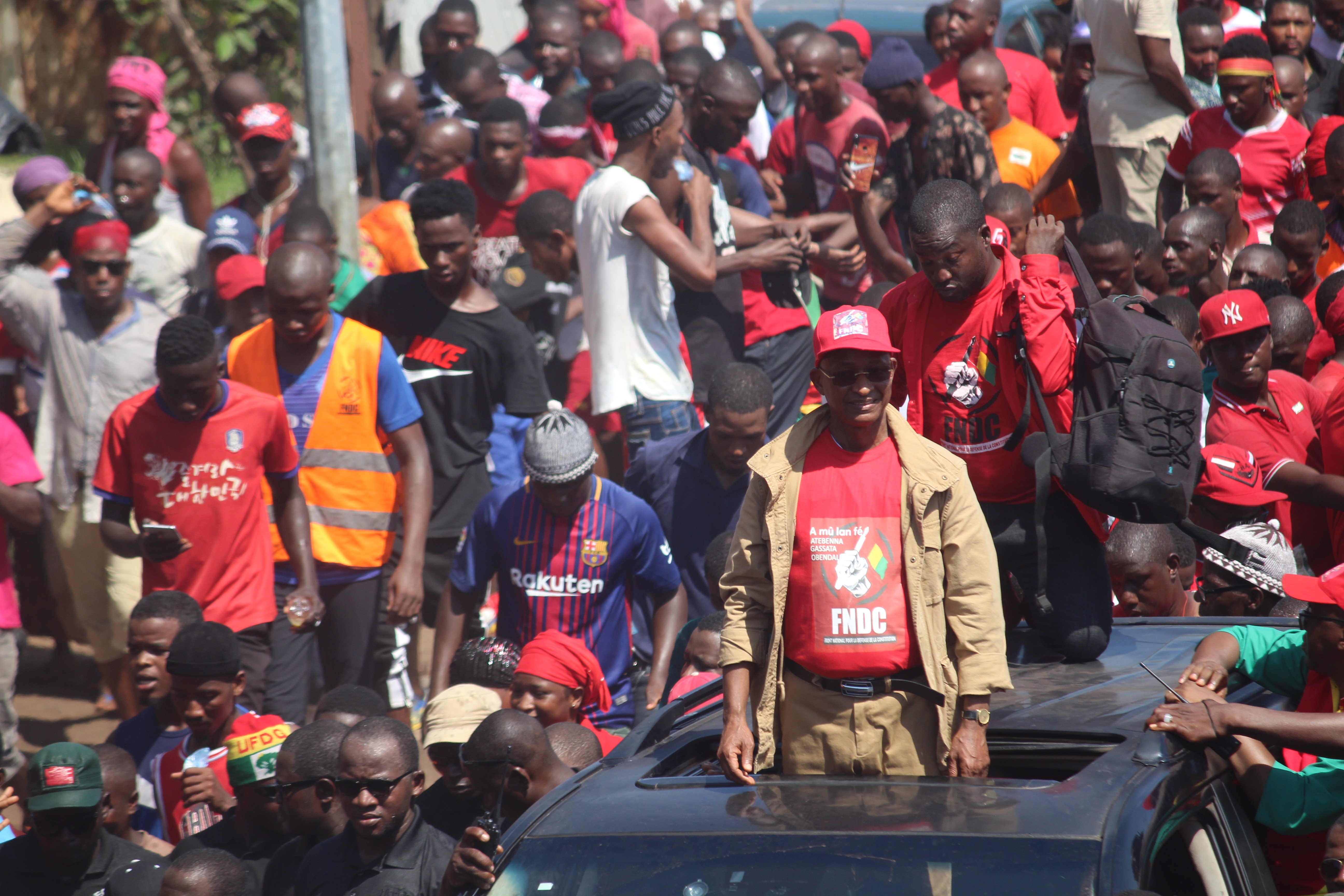 Cellou Dalein Diallo a la marche du FNDC This is an image with the theme "Africa on the Move or Transport" from: Guinea